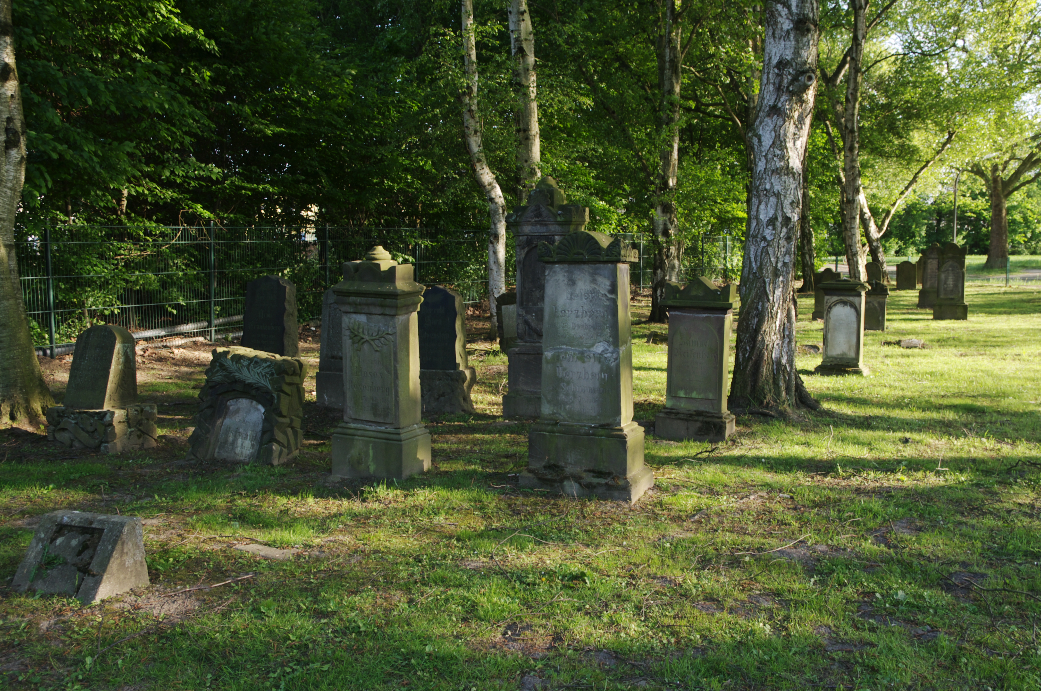 Der Alte Jüdische Friedhof Aplerbeck ist in die Denkmalliste der Stadt Dortmund eingetragen.